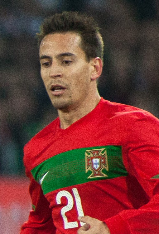 João Pedro da Silva Pereira lors du match amical Argentine-Portugal le 9 février 2011 à Genève.